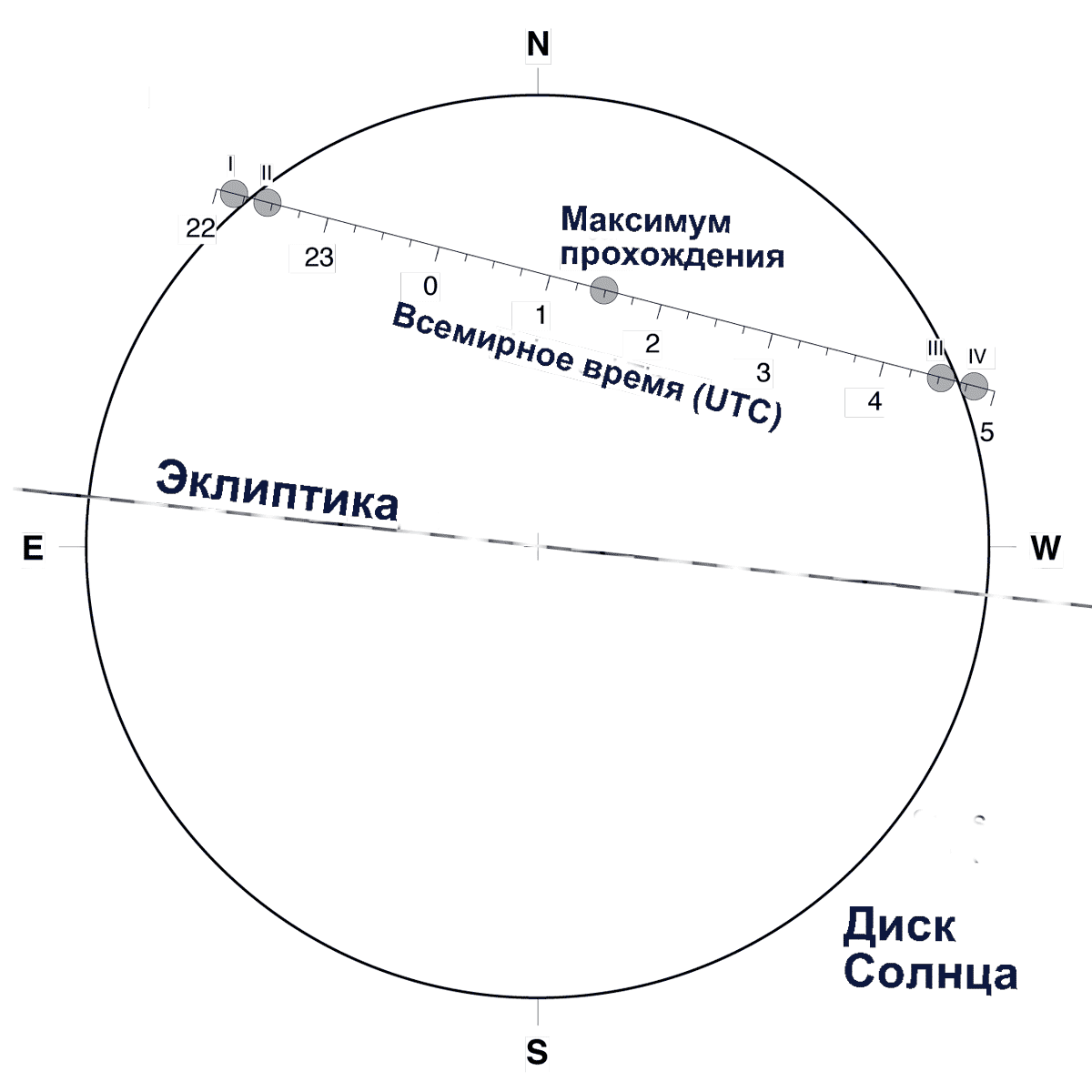 Иллюстрация из статьи с переведёнными подписями